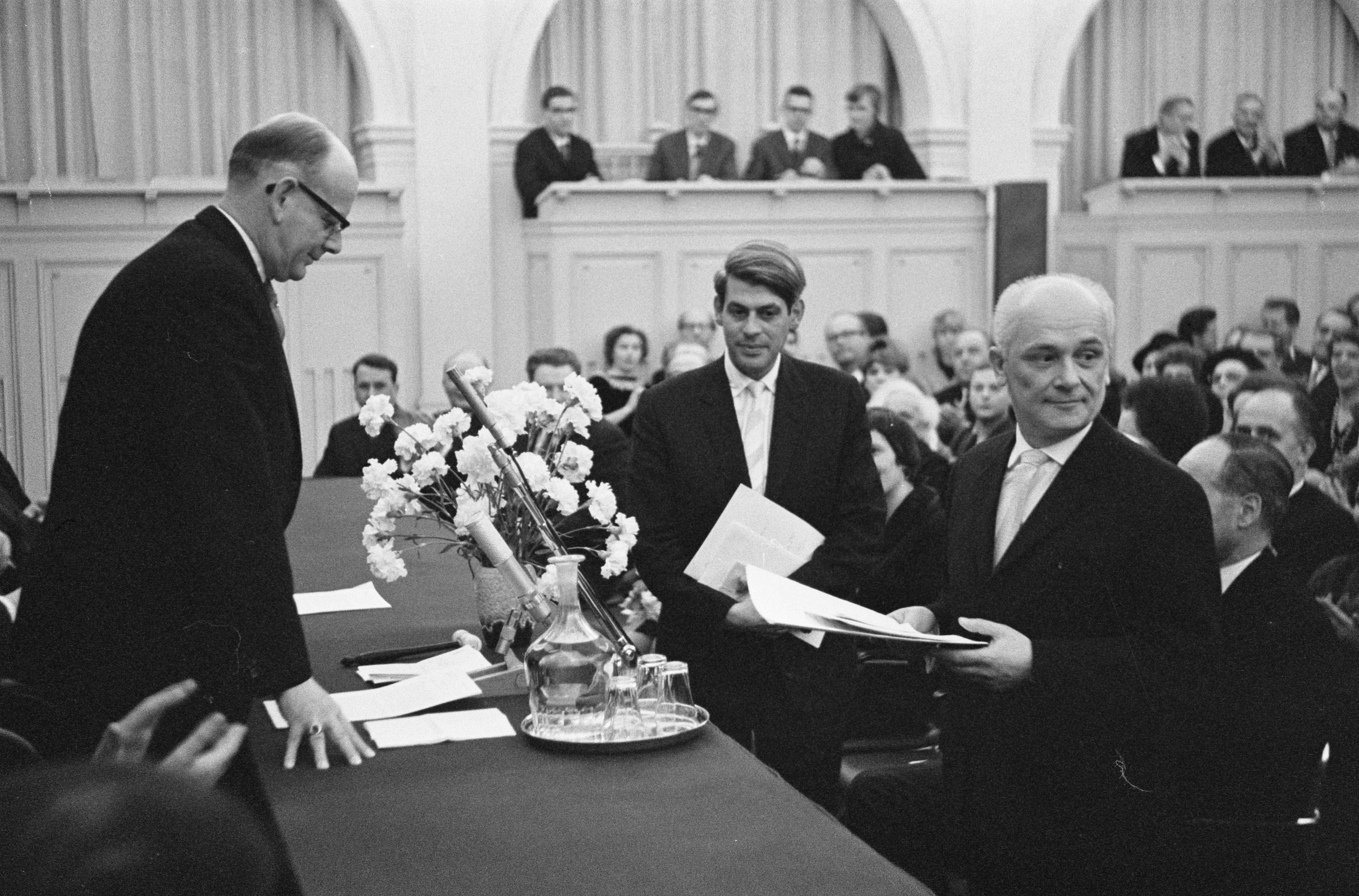 Uitreiking Nijhoffprijs voor vertalingen in Den Haag, midden de heer Johannes Piron en rechts Charles B. Timmer, prof. mr. De Gaay Fortman reikt de prijzen uit. Datum 29 januari 1963